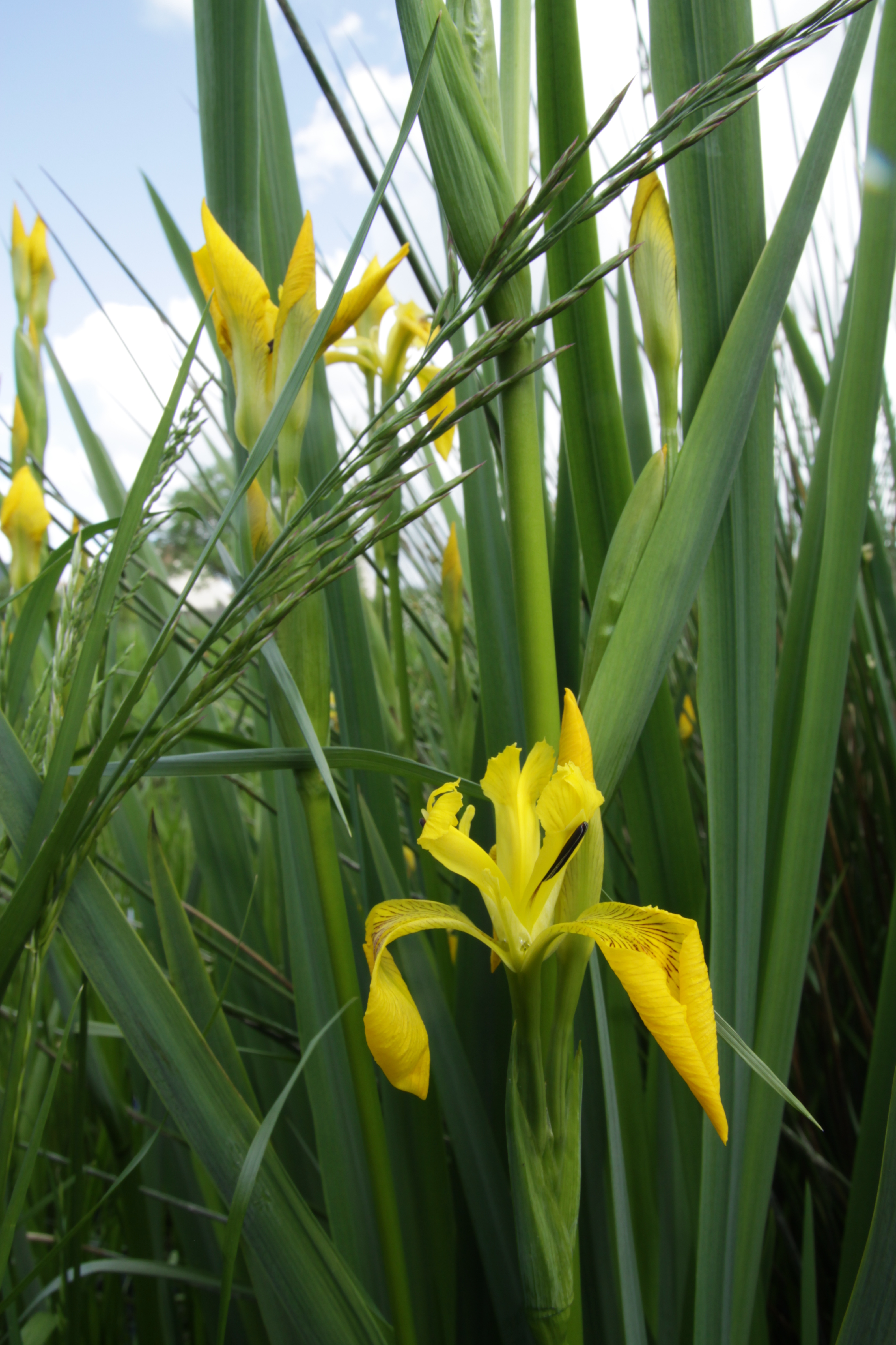 Iris des Marais